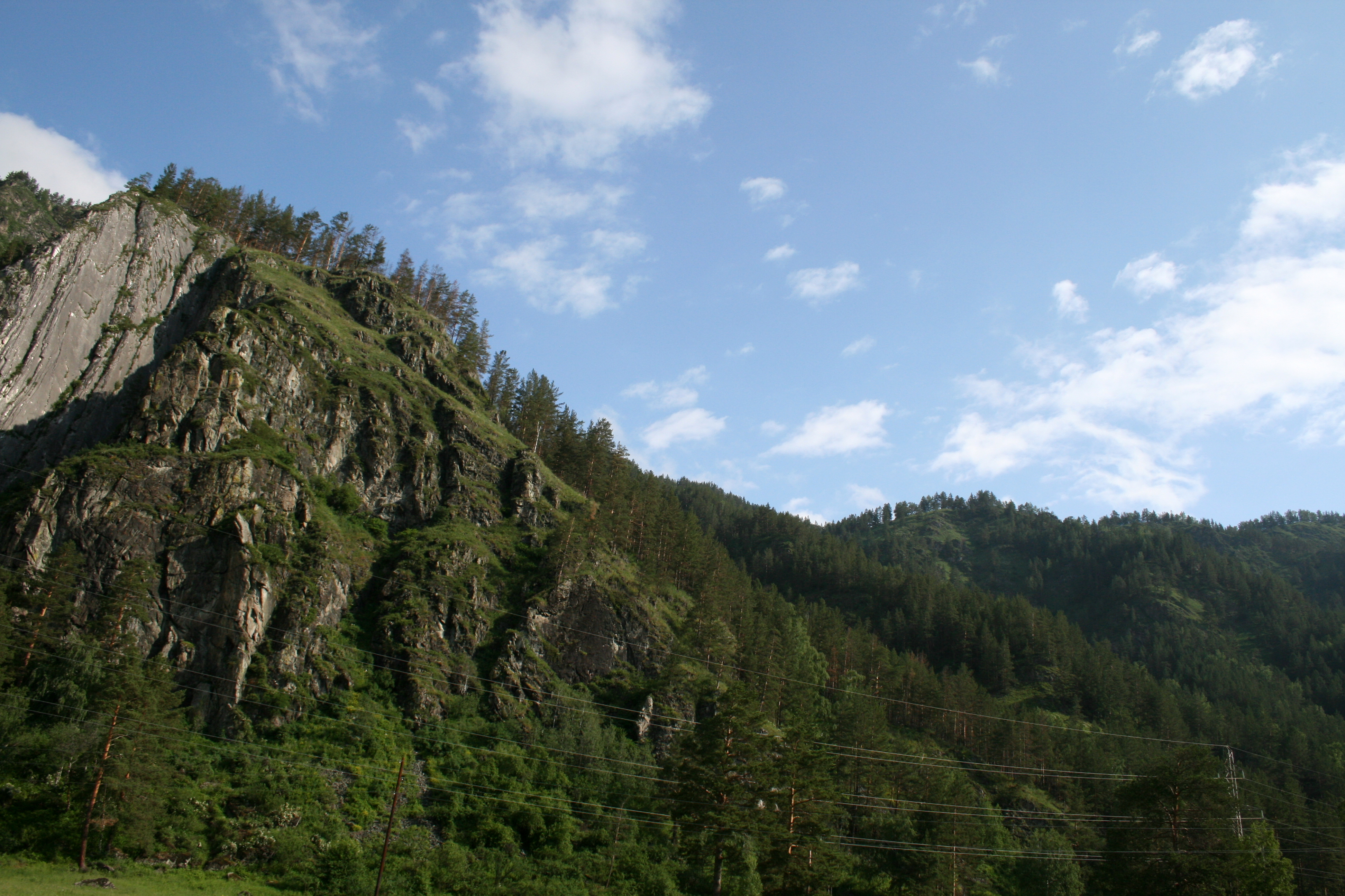 Майминский район Алтайского края